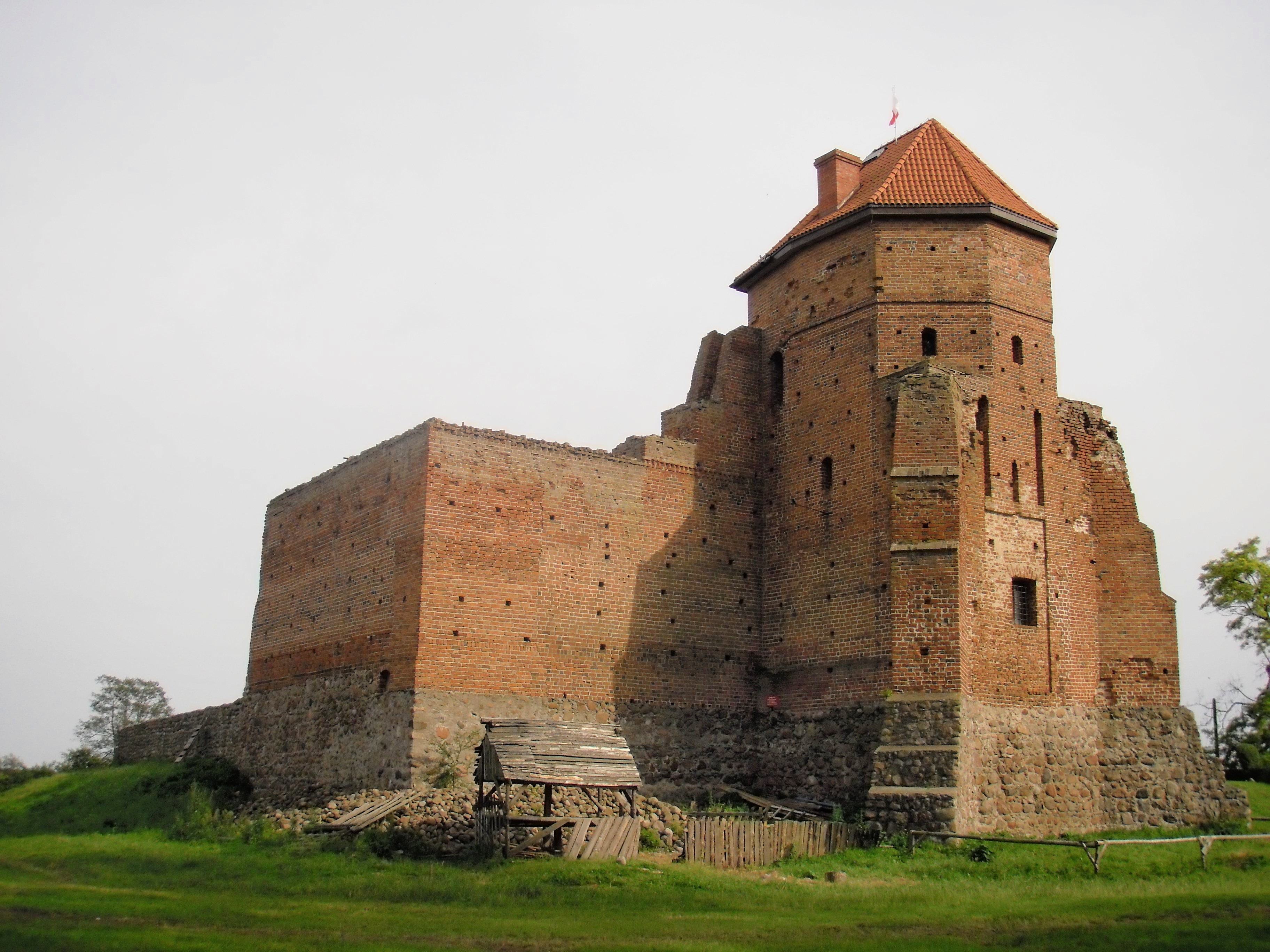 Liw, zespół zamkowy, ob. muzeum, XV-XVIII, XX